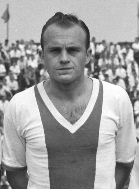 Piet Ouderland.